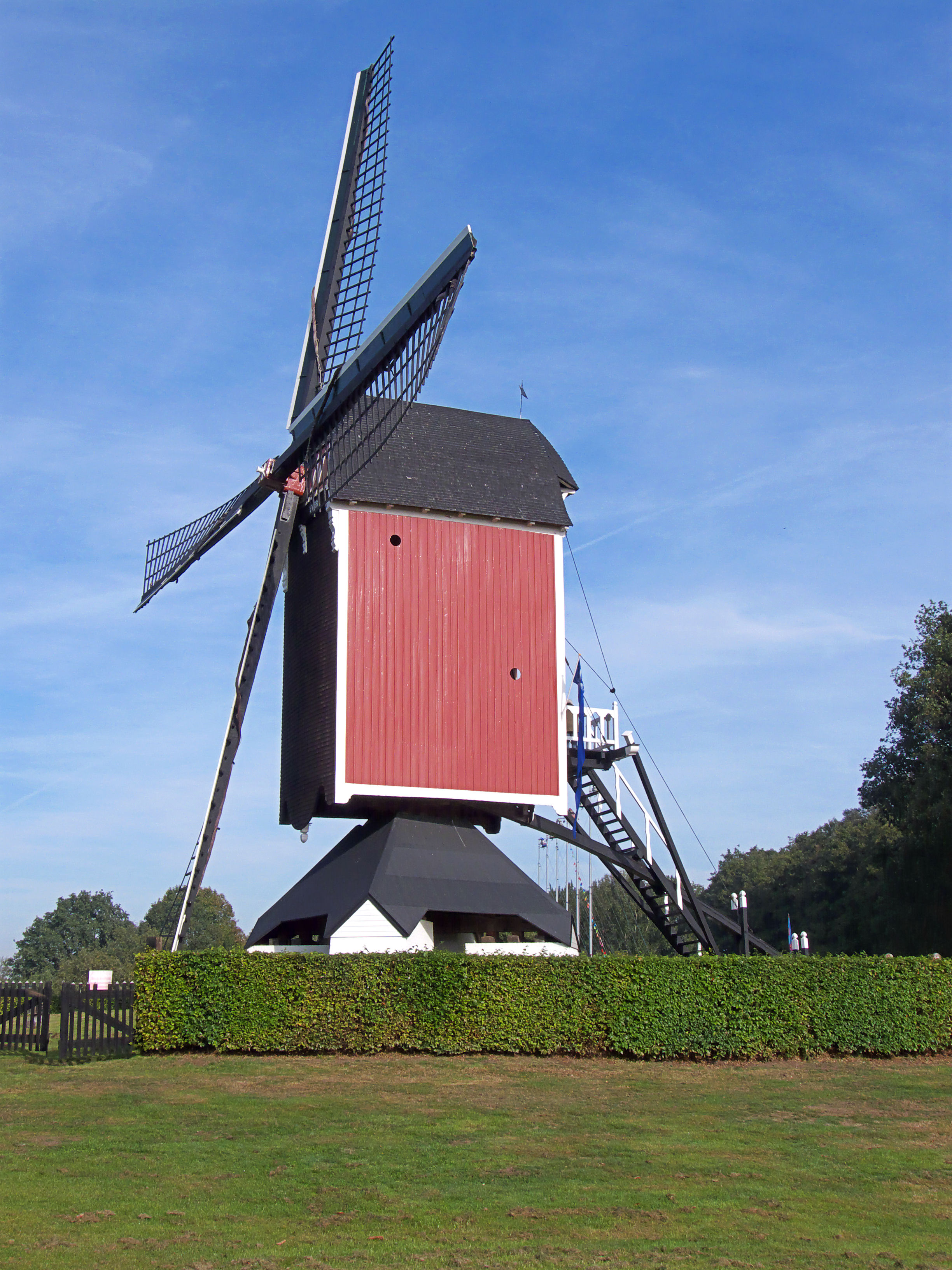 Standerdmolen Den Evert met twee binnenroeden. Let op de porring.